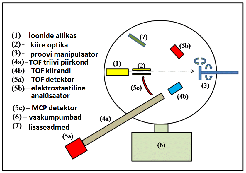 Aparatuuri erinevad osad